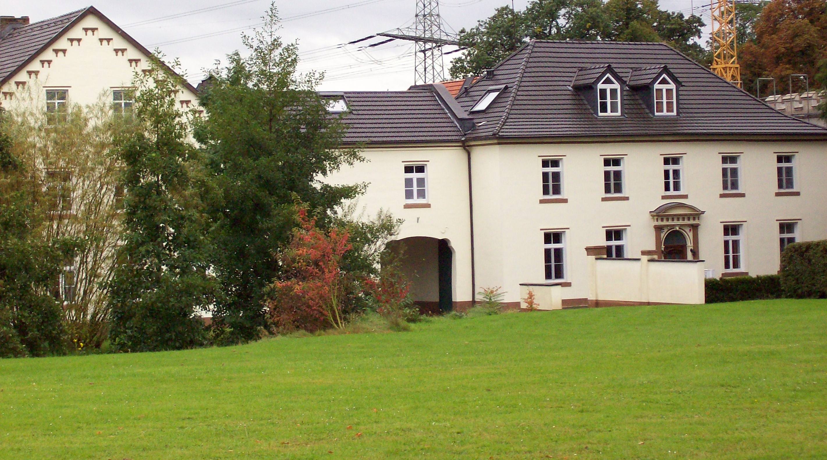 Godorfer Hof (Burg) in Wesseling (Germany)